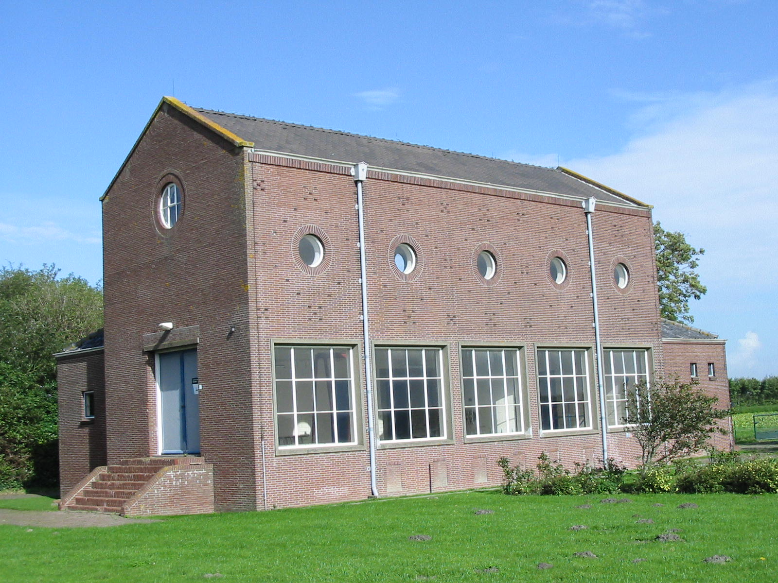 Gemaal bij Zierikzee, eigen foto gemaakt door Gebruiker:Ellywa, ter beschikking gesteld onder GFDL